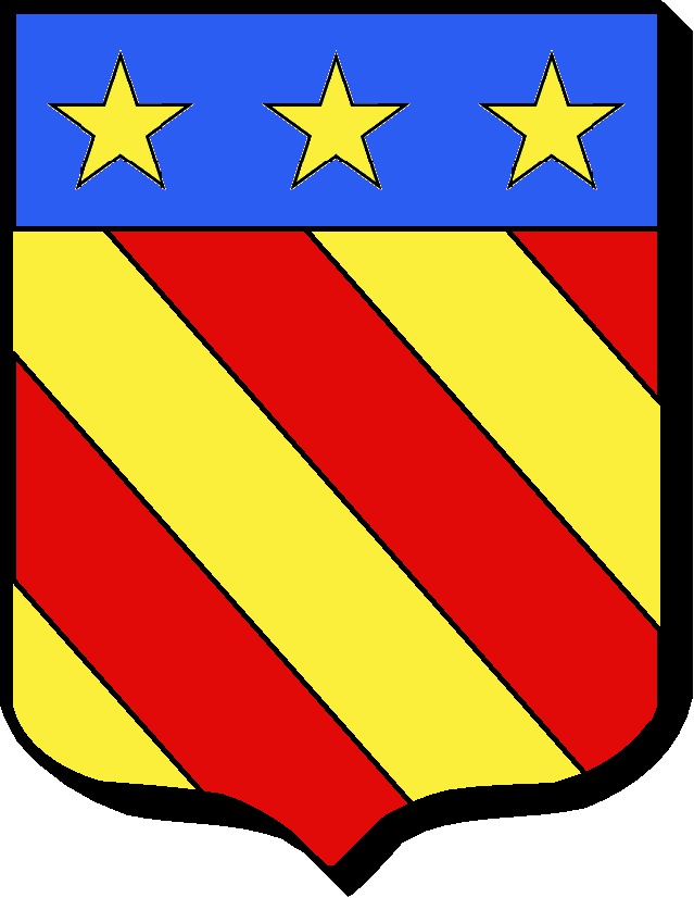 D'or à trois bandes de gueules, au chef d'azur chargé de trois étoiles d'or.